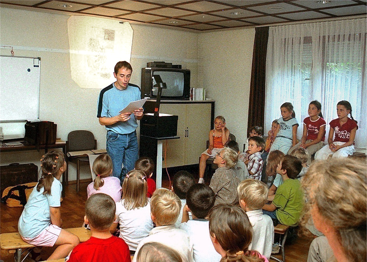 Stefan Gemmel, Kinderbuchautor, bei einer öffentlichen Veranstaltung in Mülheim-Kärlich